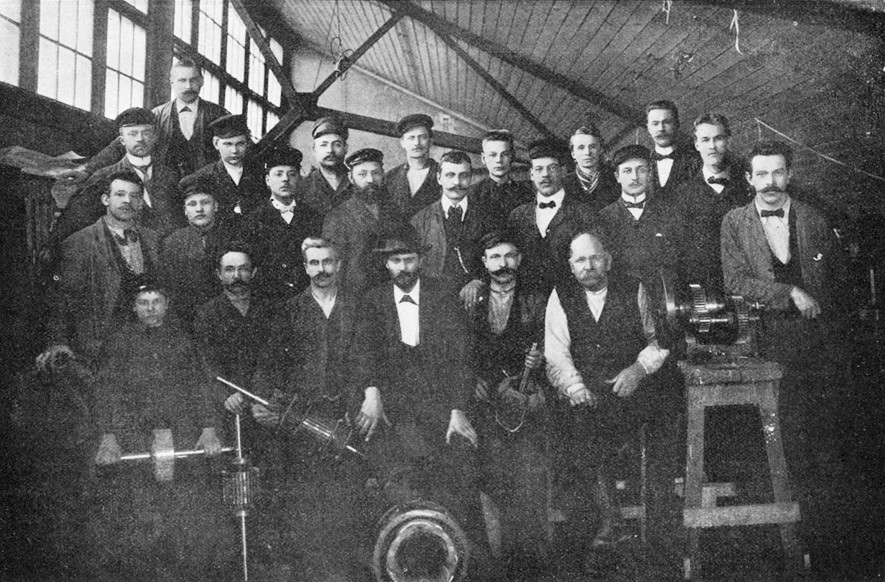 Arbetare vid Luth & Rosén. Fotot taget vid sekelskiftet av en arbetare